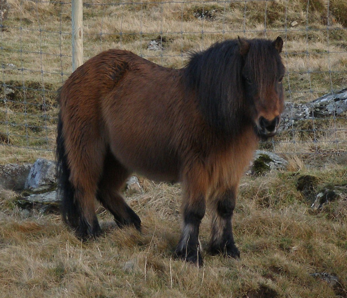 Færøsk vallak Grani1 med vinterpels